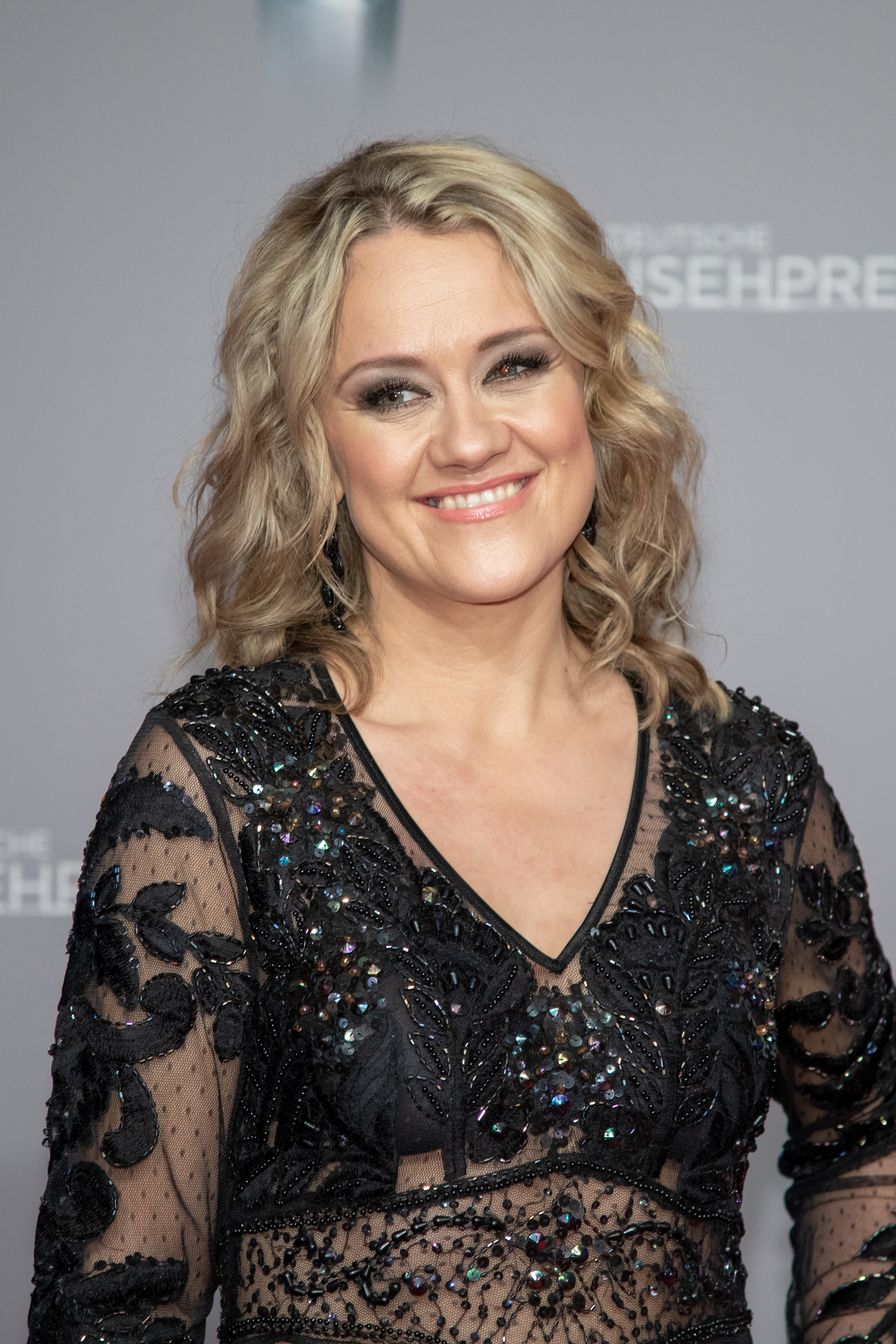 Lisa Feller beim Deutschen Fernsehpreis 2019 in der Düsseldorfer Rheinterrasse